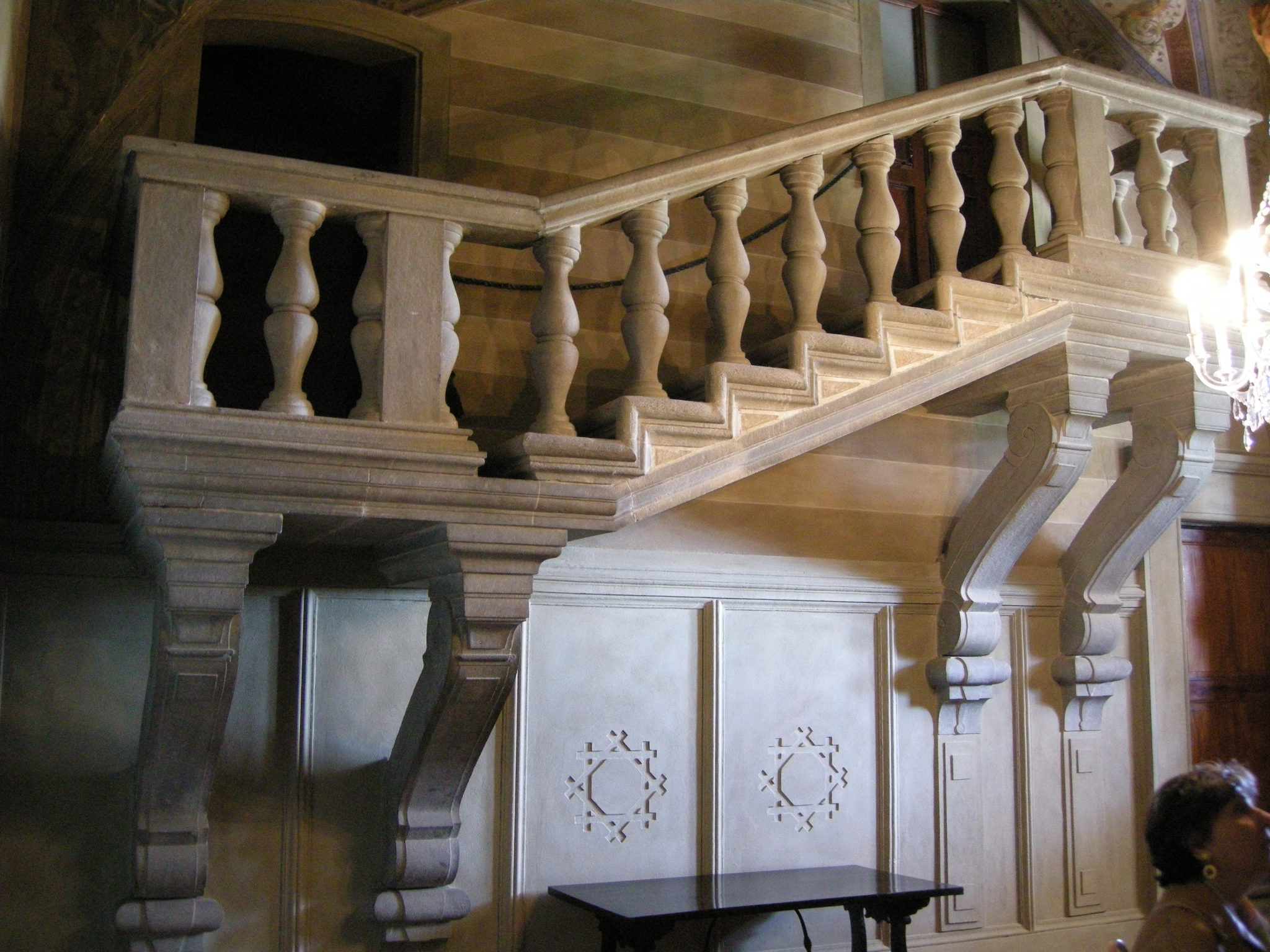 Villa di poggio a caiano, stanza di bianca cappello, scalone